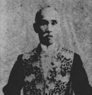 井原昻（1840-1923）